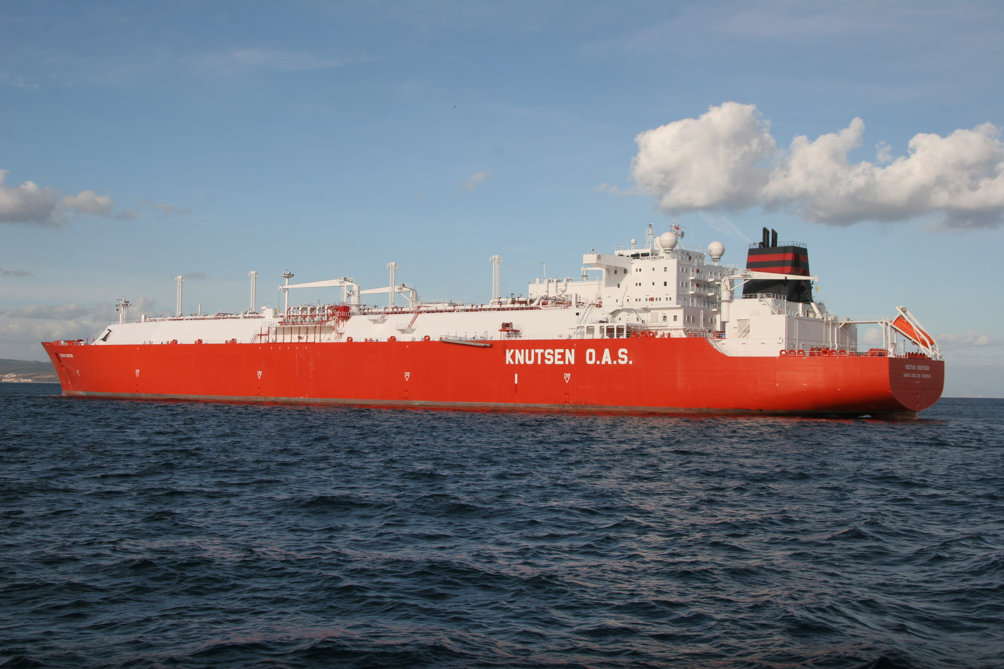 Methanier approvisionnant du GNL